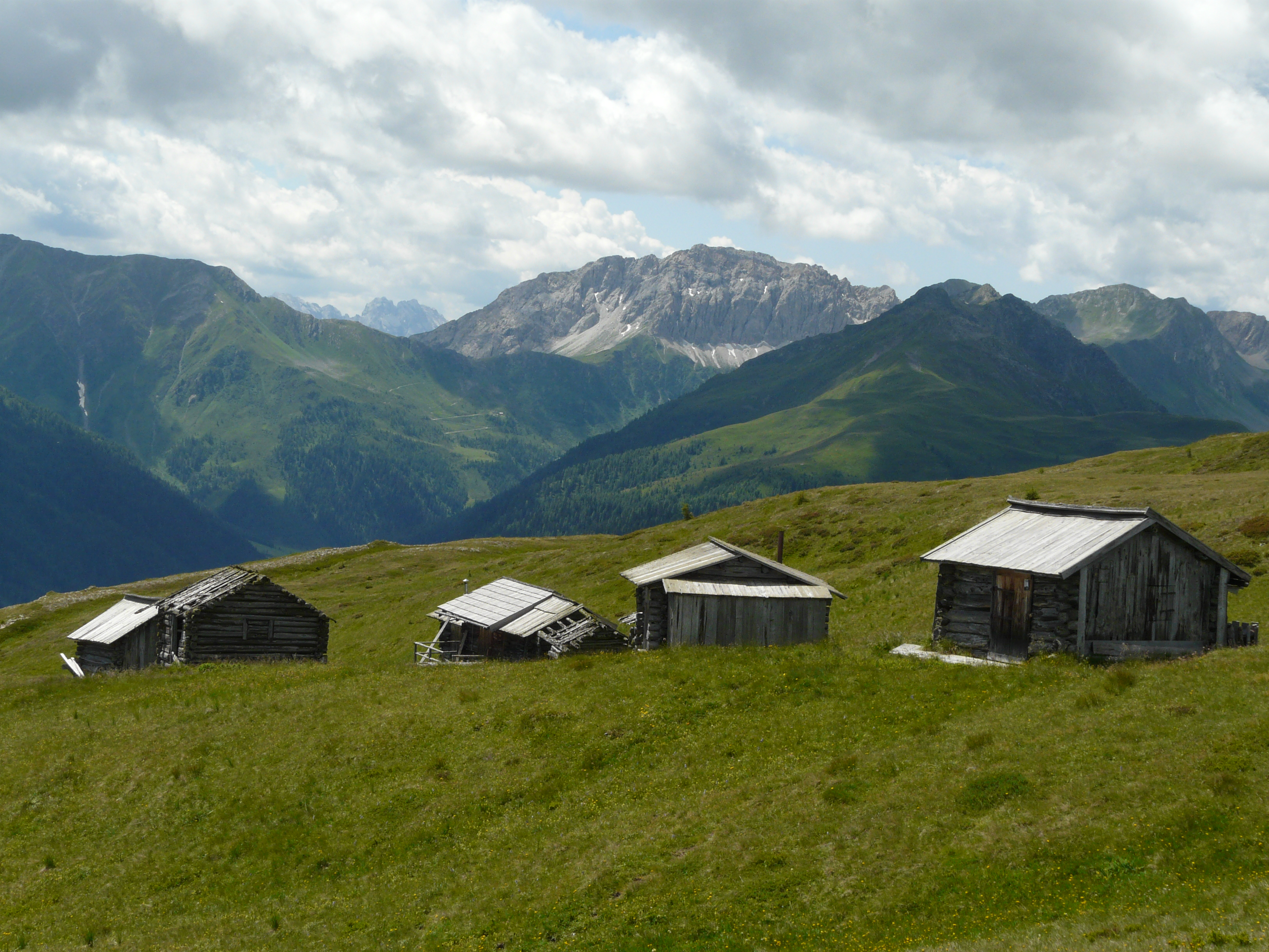 Am Jochsee des Golzentipp-Gipfels: Heuschober mit Porze im Hintergrund, Talort: Obertilliach